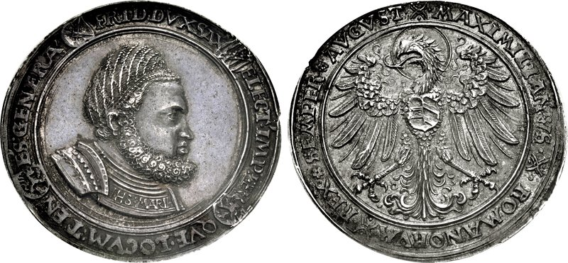 GERMANY, Sachsen-Ernestinische Linie (Kurfürstentum). Friedrich III der Weise (the Wise). 1486-1525. AR Guldengroschen (49mm, 28.76 g, 11h). Hall mint. Struck 1512. Armored bust right, wearing embroidered cap / Nimbate eagle facing with wings spread, head left. Davenport 9699; Schnee 37; Merseburger 417. In NGC encapsulation graded MS 63. Among the finest known. Ex Millenia Collection (Part II, Goldberg, 26 May 2008), lot 675; Virgil M. Brand Collection (Part IV, Leu 69, 5 June 1997), lot 5020. Triton XIX, Lot: 744. Schätzpreis $ 20.000. Verkauft für 19.000 $. Dieser Betrag beinhaltet nicht die Gebühr des Käufers. DEUTSCHLAND, Sachsen-Ernestinische Linie (Kurfürstentum). Friedrich III der Weise (der Weise). 1486-1525. AR Guldengroschen (49mm, 28,76 g, 11h). Halle Minze. Struck 1512. Gepanzerte Büste rechts, gestickte Kappe / Nimbate Adler trägt Lage mit ausgebreiteten Flügeln, links Kopf. Davenport 9699; Schnee 37; Merseburger 417. In NGC Verkapselung abgestuft MS 63. Unter den bekannten feinsten. Ex Millenia Collection (Teil II, Goldberg , den 26. Mai 2008), Los 675; Virgil M. Marke Collection (Teil IV, Leu 69, den 5. Juni 1997), Los 5020.